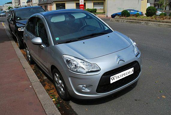 Citroen C3 second generation.